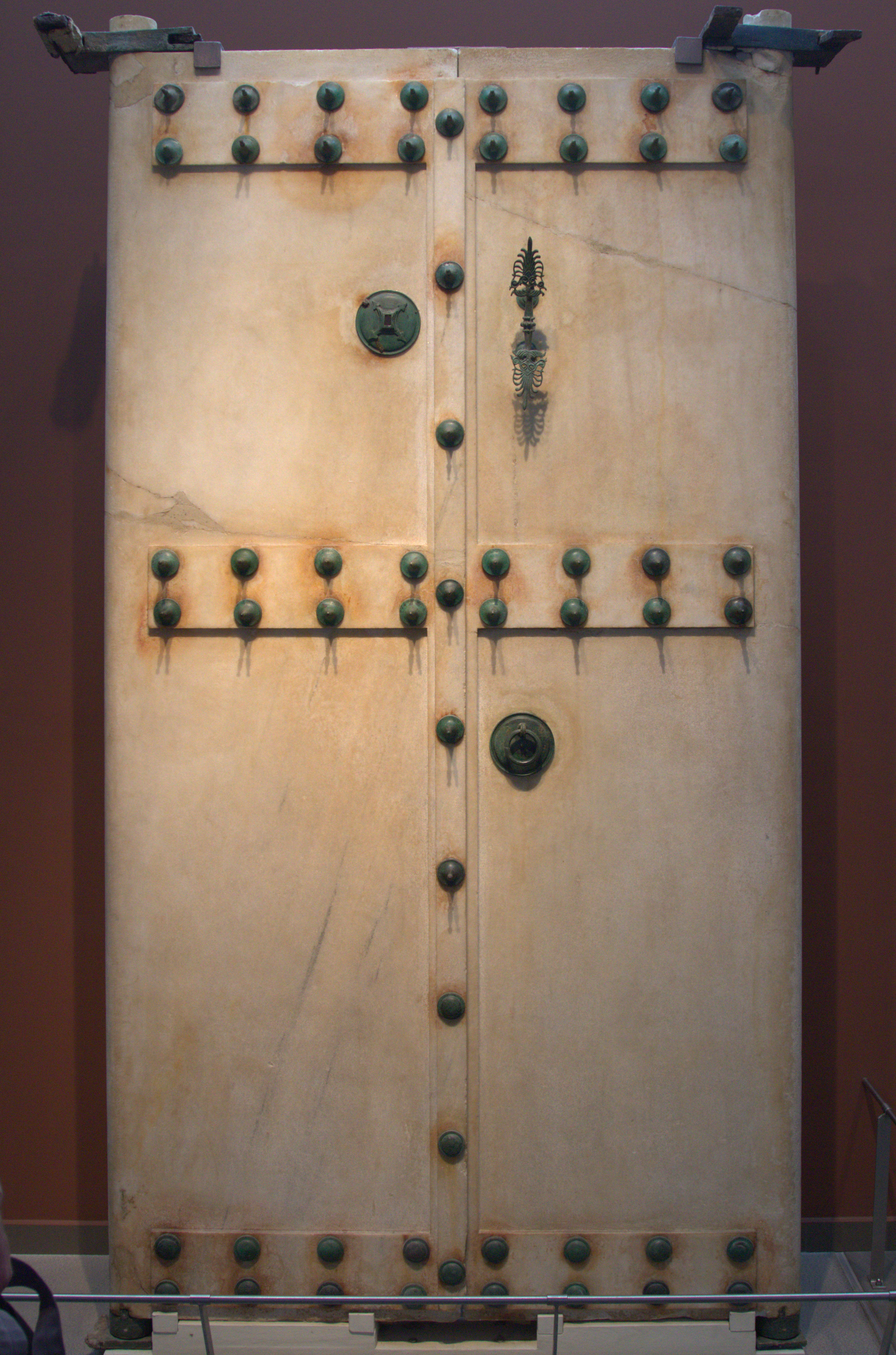 It is 6.5m. long, 4m. wide and 4.8m. high. Its facade is white, and bears painted architectural decoration. It has an antechamber and main chamber painted in many colors. Tomb raiders looted it in antiquity, but left behind certain objects they considered of little value. The tomb is dated to the end of the 4th c. B.C. Archaeological Museum of Thessaloniki, Greece. --- Ο μακεδονικός τάφος της Αγίας Παρασκευής. Έχει μήκος 6,5., πλάοτς 4μ. και ύψος 4,80μ. Η πρόσοψη του είναι λευκή, με ζωγραφιστή αρχιτεκτονική διακόσμηση. Έχει προθάλαμο και θάλαμο ζωγραφισμένους με πολυχρωμία. Ο τάφος ήταν συλημένος ήδη από την αρχαιότητα. Διασώθηκαν όμως ορισμένα κτερίσματα τα οποία οι αρχαιοκάπηλοι δεν θεώρησαν αξιόλογα. Χρονολογείται στα τέλου του 4ου αι. π.Χ. Αρχαιολογικό Μουσείο Θεσσαλονίκης.